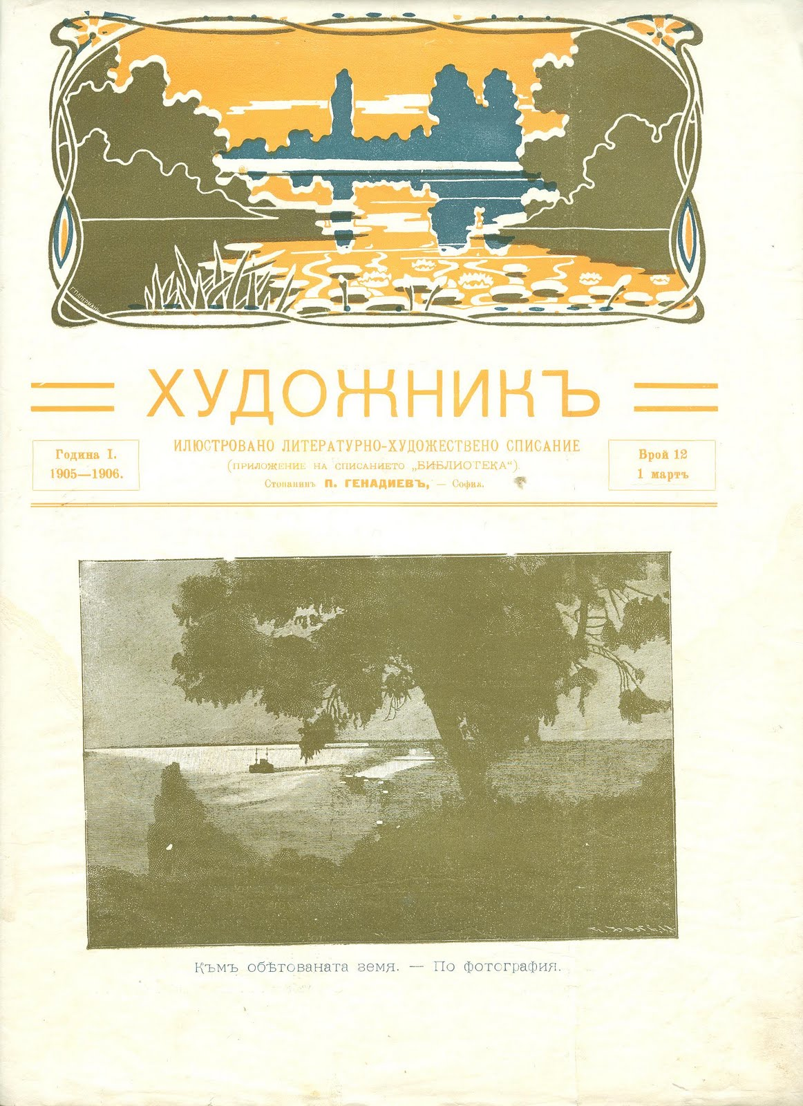 "Художник".